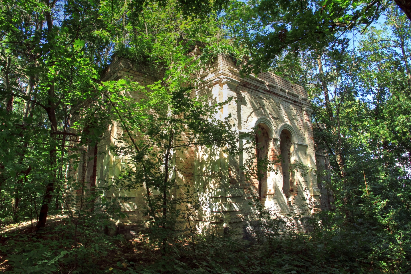 Столниченский парк, монумент природы, находится в Единецкий район, с. Столничень (код MD-ED-map-015)